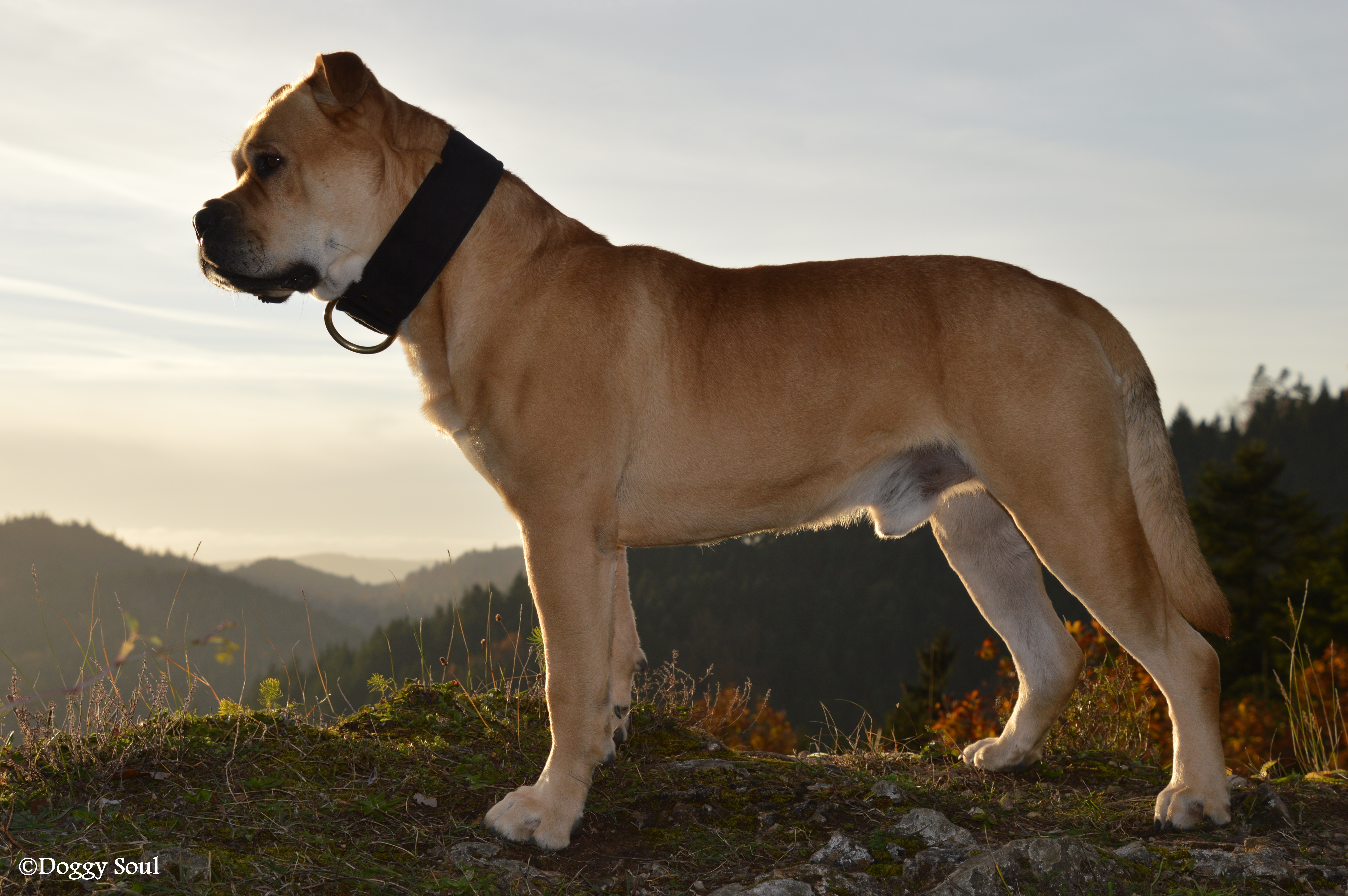 Gagnant de la Monografica 2012 à Majorque